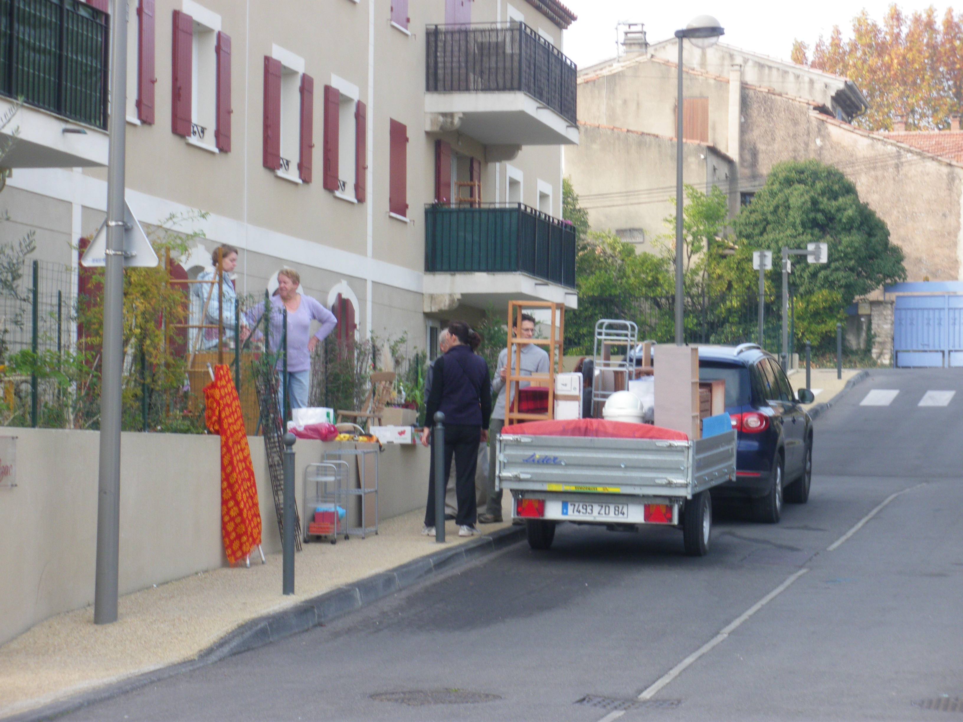 déménagement : on entasse dans la remorque